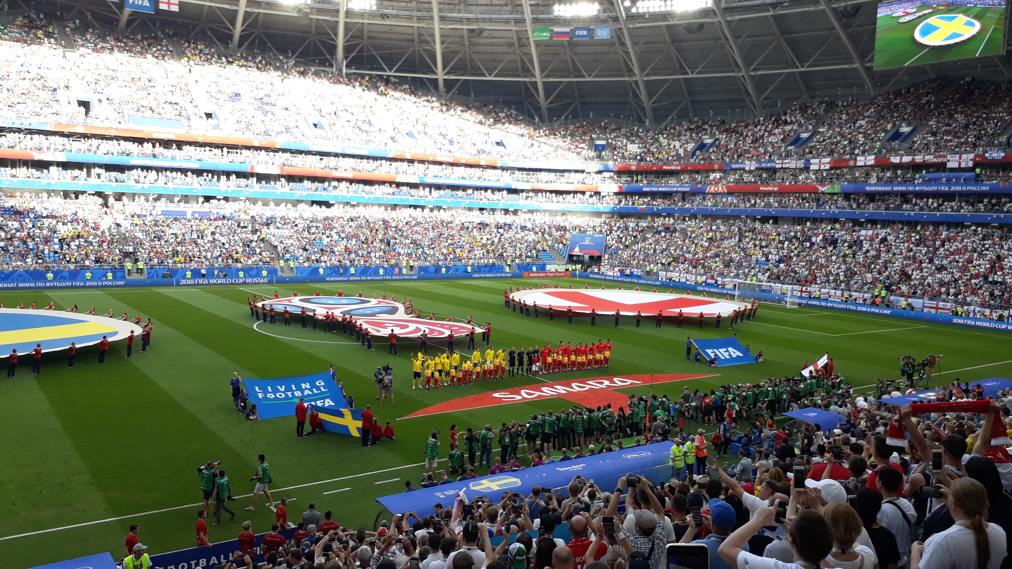 quarter final